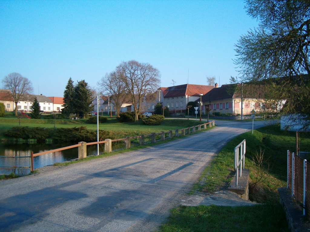 Náves v Hradišťku u Dačic